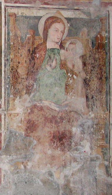 Madonna in trono, affresco del XIV secolo. Di incerta attribuzione, forse del "Maestro delle Nozze Mistiche". Chiesa di San Giorgio in Lemine (ad Almenno San Salvatore, Bergamo). Fotografia di Giorces.